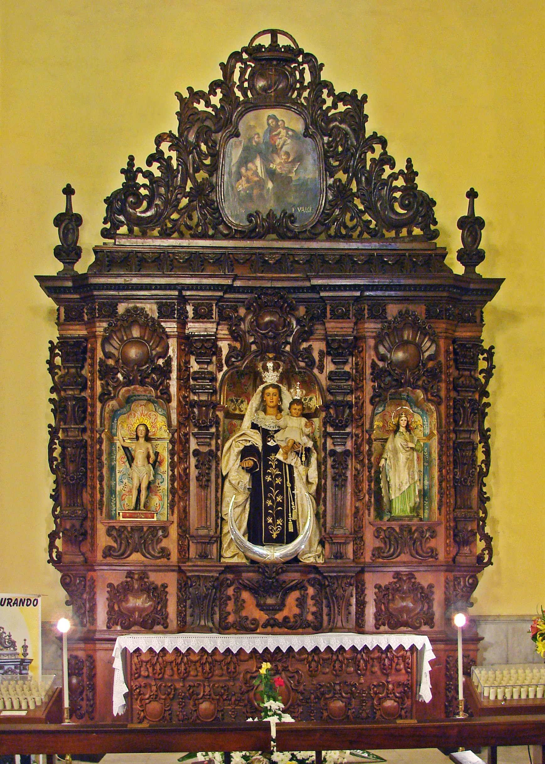 Altar-Retabel der „Jungfrau del Carmen“ in der Kirche Nuestra Señora de la Peña de Francia in Puerto de la Cruz